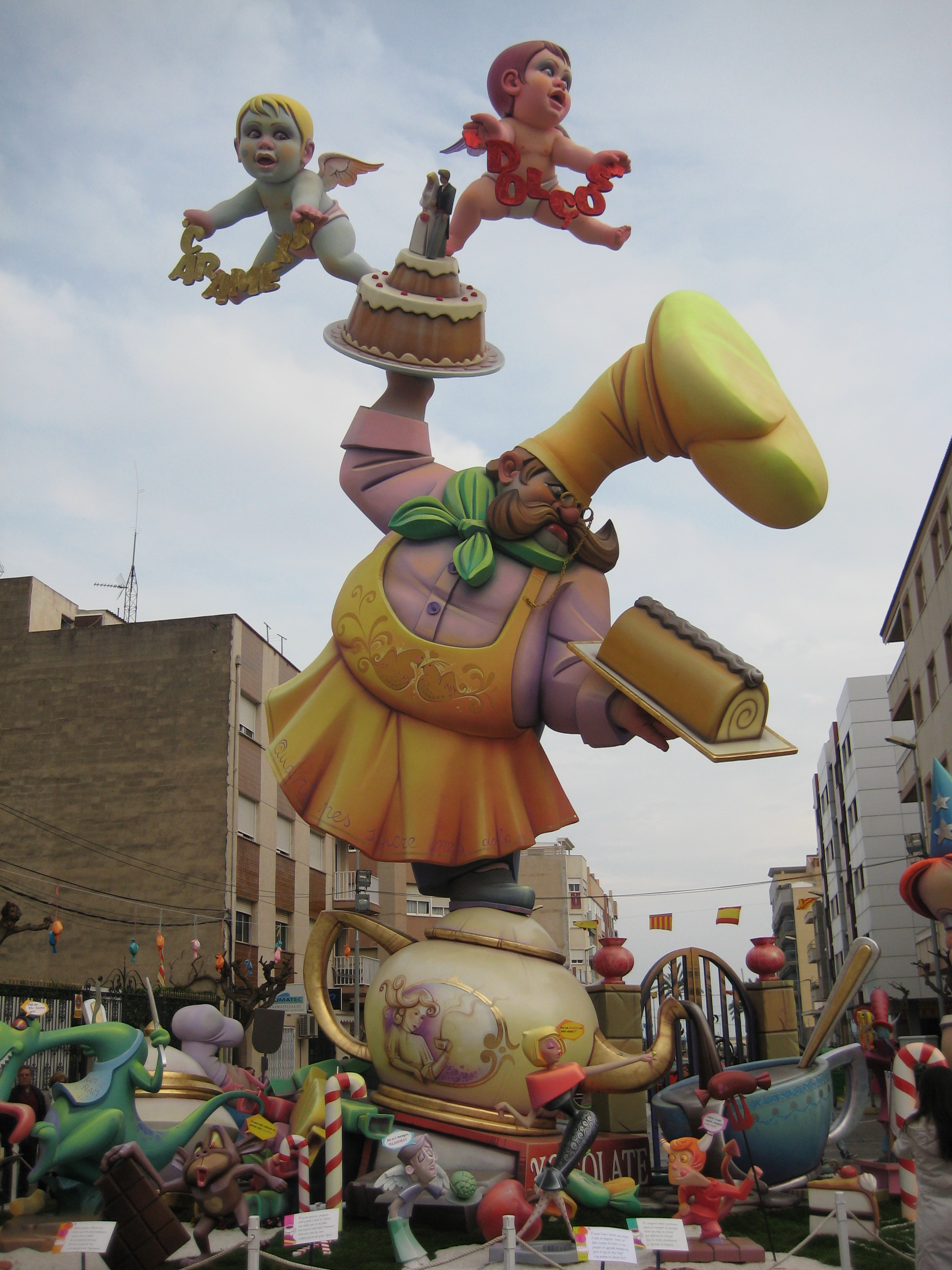 Falla Benicarló 2010 de Benicarló (Baix Maestrat)